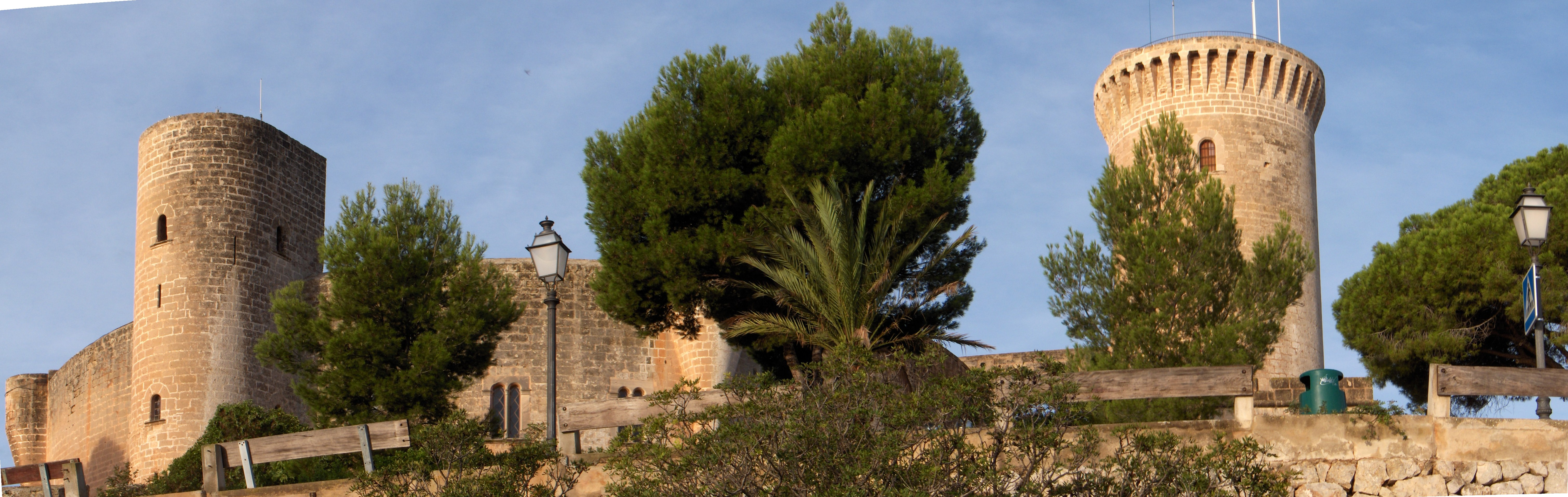 Bellver castle in Palma de Mallorca